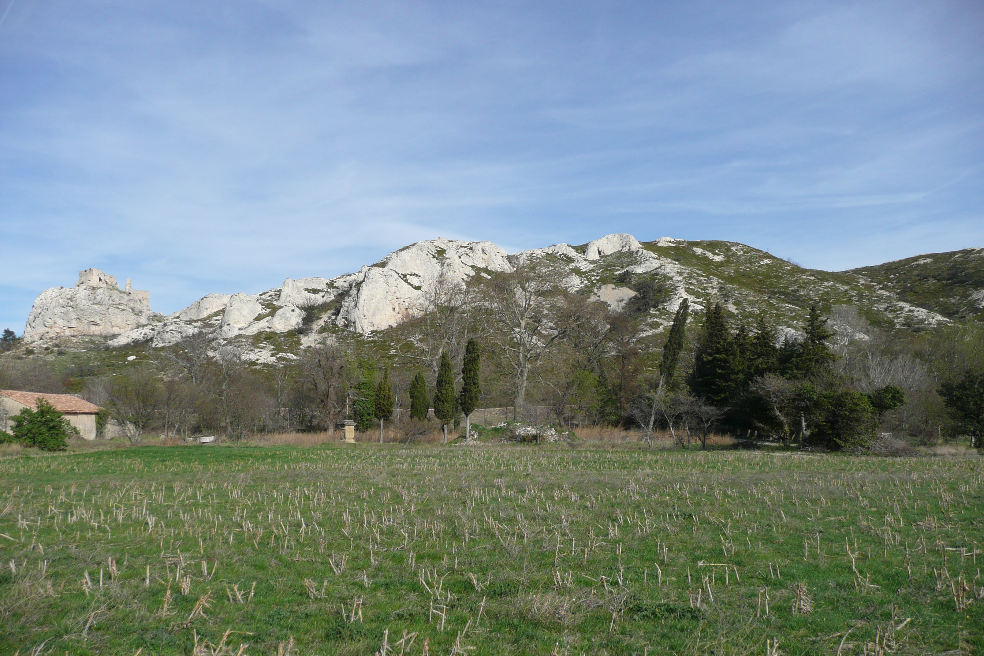 Paysage près d'Eyguières.